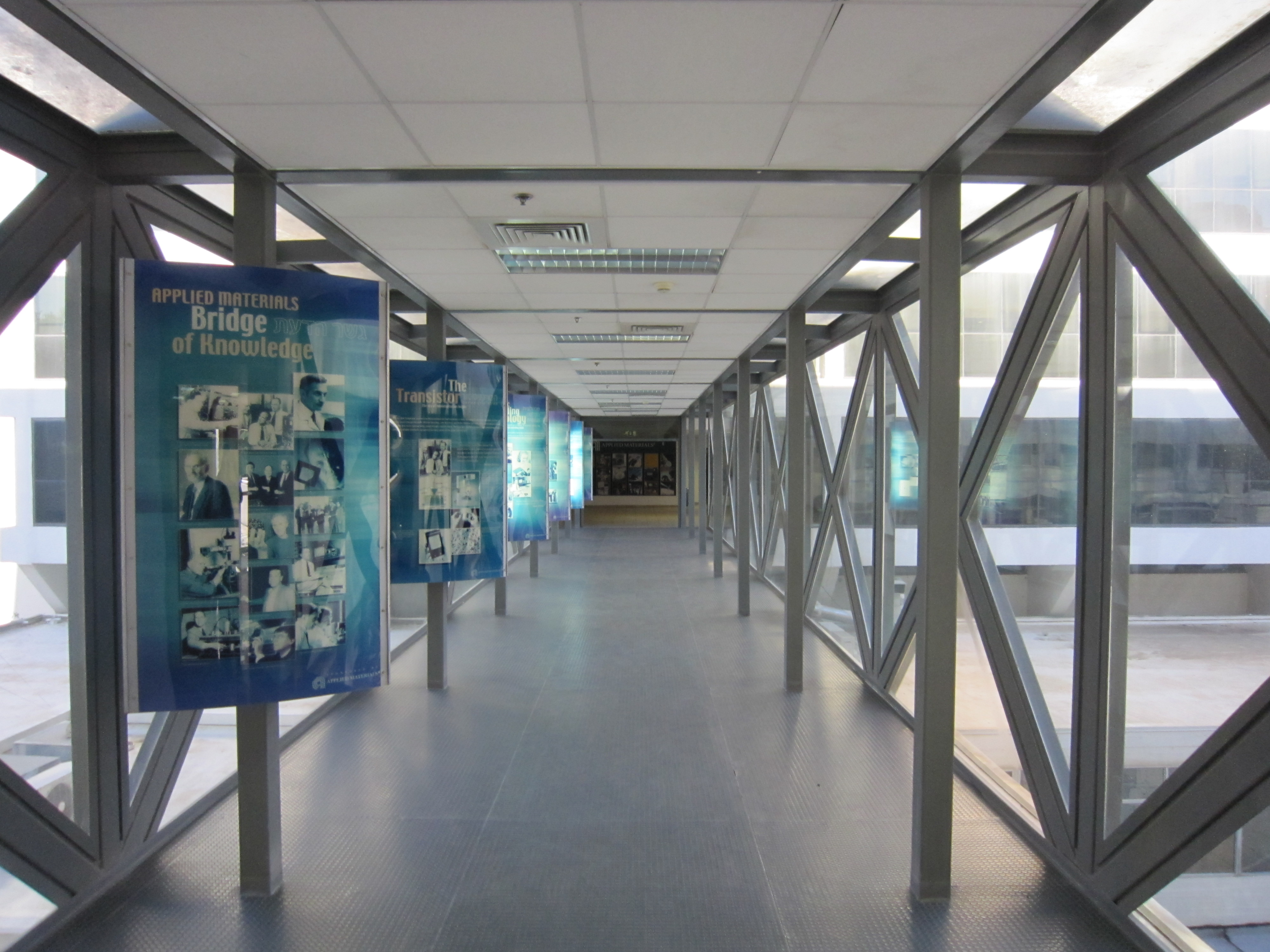 הפקולטה להנדסת חומרים בטכניון